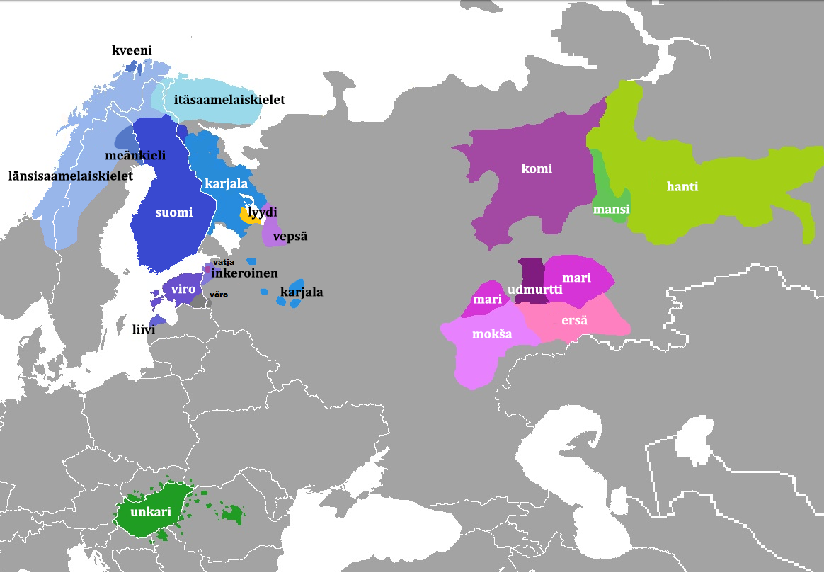 fugric kielet